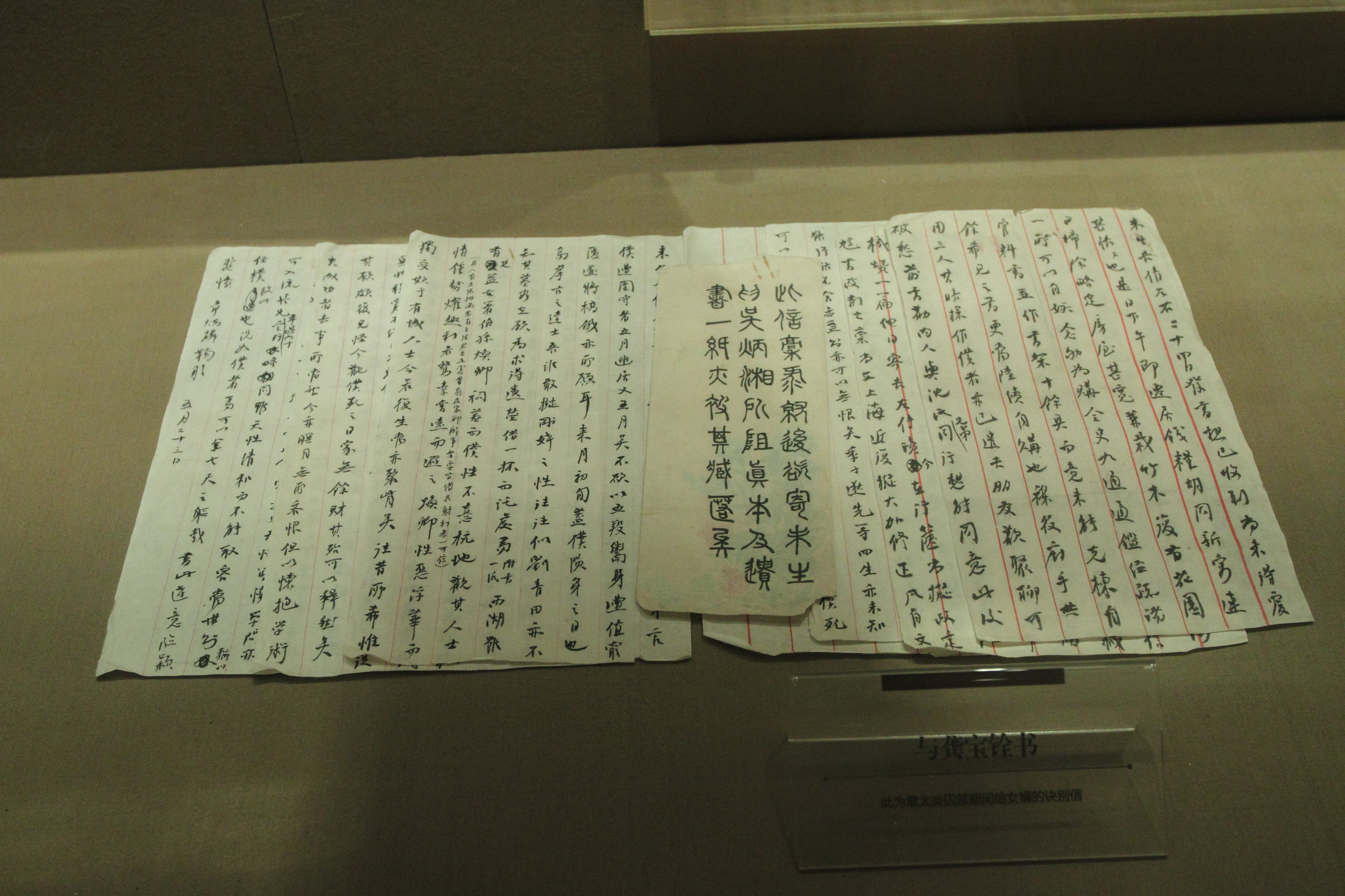 中国浙江杭州章太炎纪念馆收藏章太炎手迹。